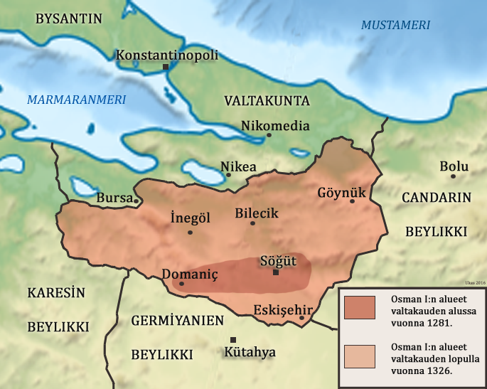 Kartta Osman I:n alueista 1281-1326